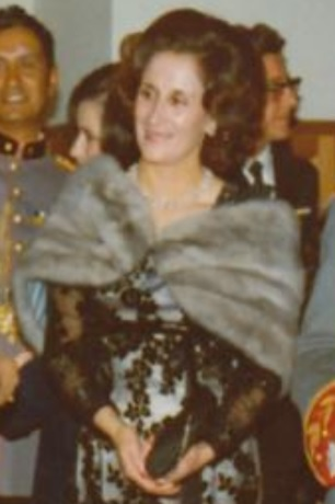 Aída Judith León en el Salón de Banquetes del Palacio de Carondelet (1975). Tomado del álbum familiar de los Rodríguez León.